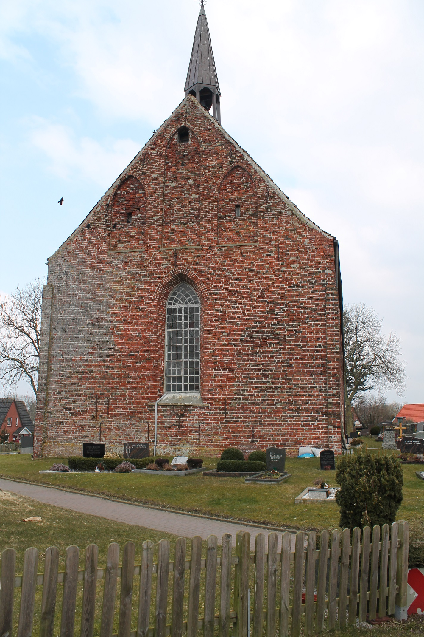 Westseite der Groß Midlumer Kirche, Ostfriesland, Niedersachsen, Deutschland